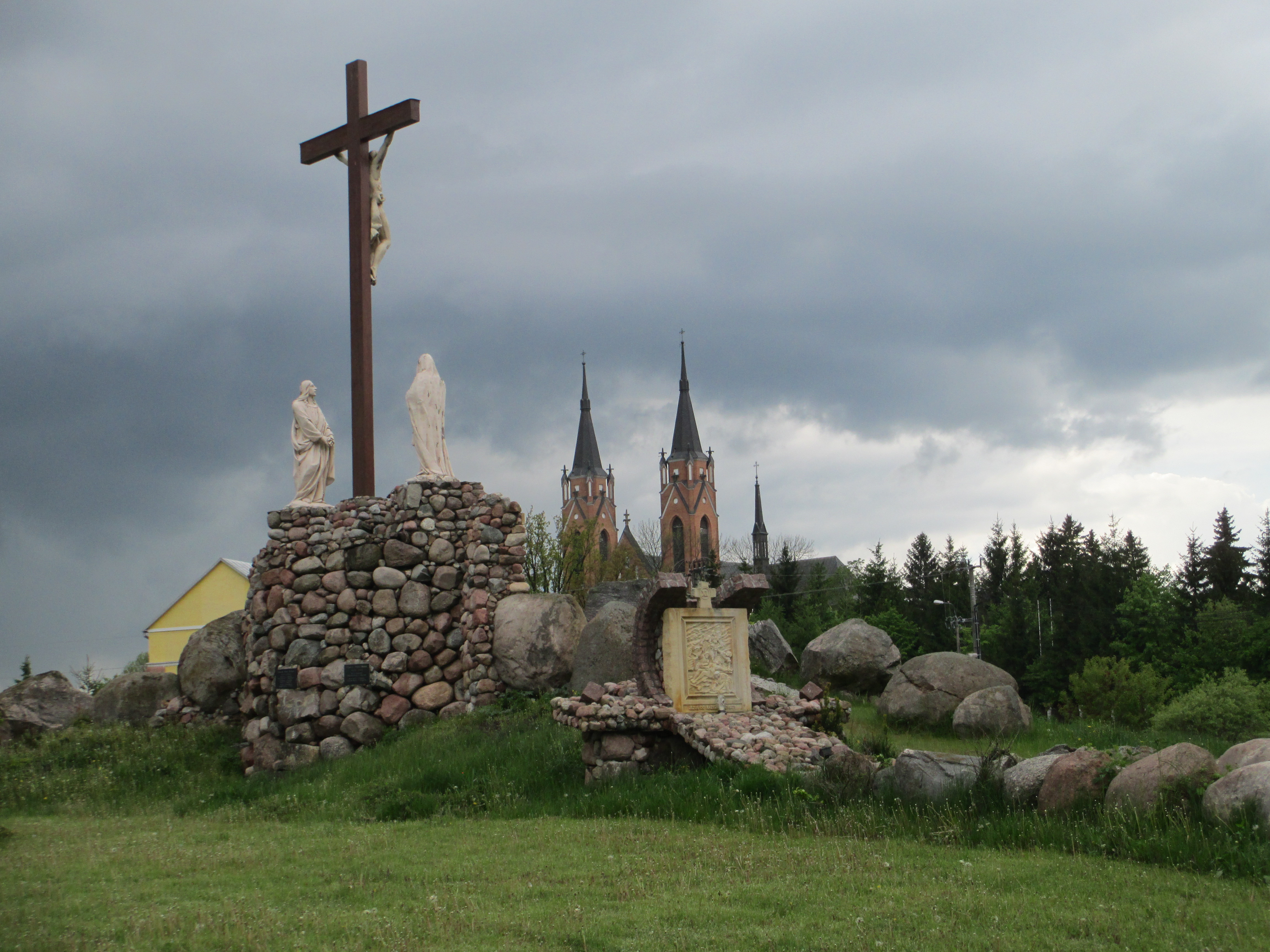 Droga krzyżowa z Kościołem Parafialnym pw. NMP w Rajgrodzie